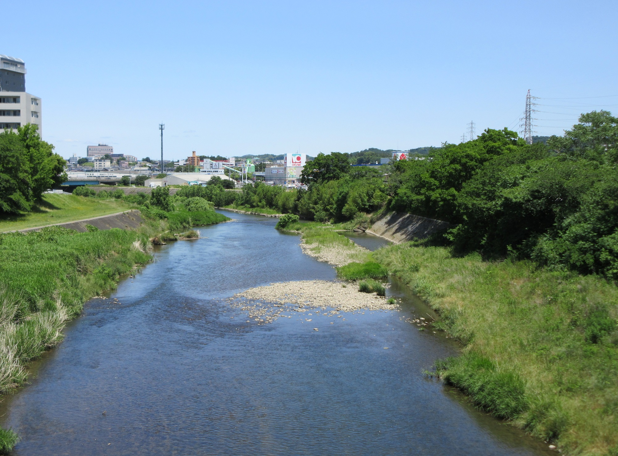 御用橋から乙川下流を望む